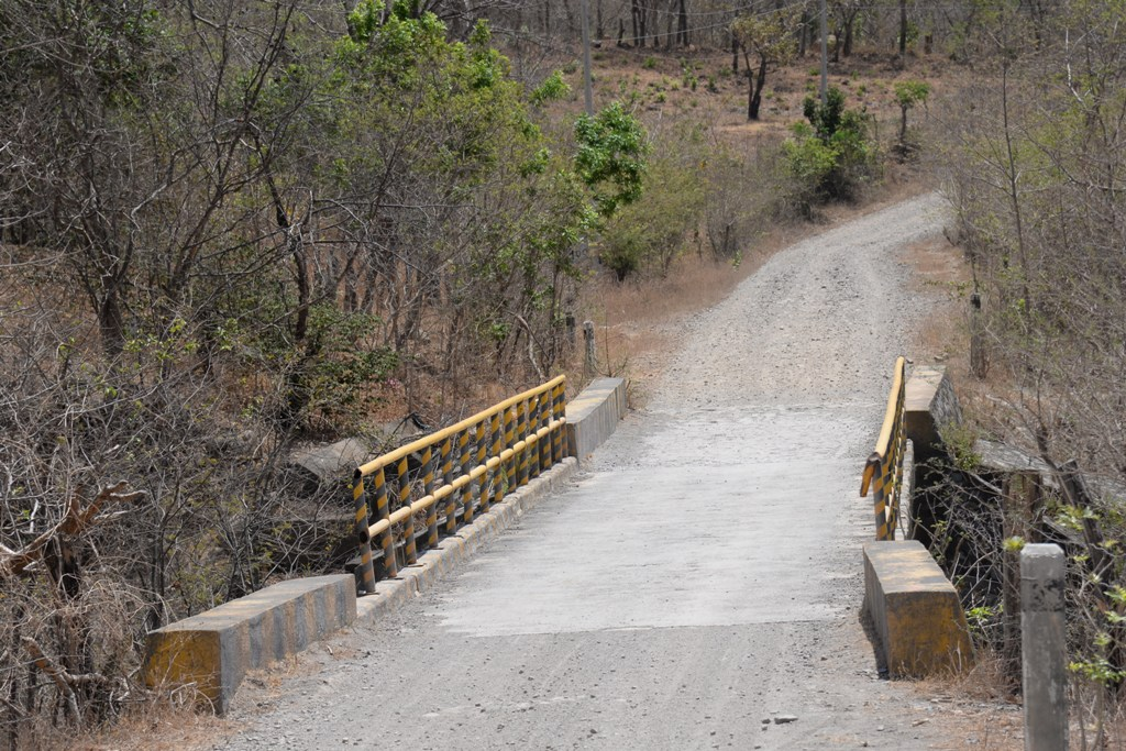 Puente en San Antonio, Achuapa, Nicaragua